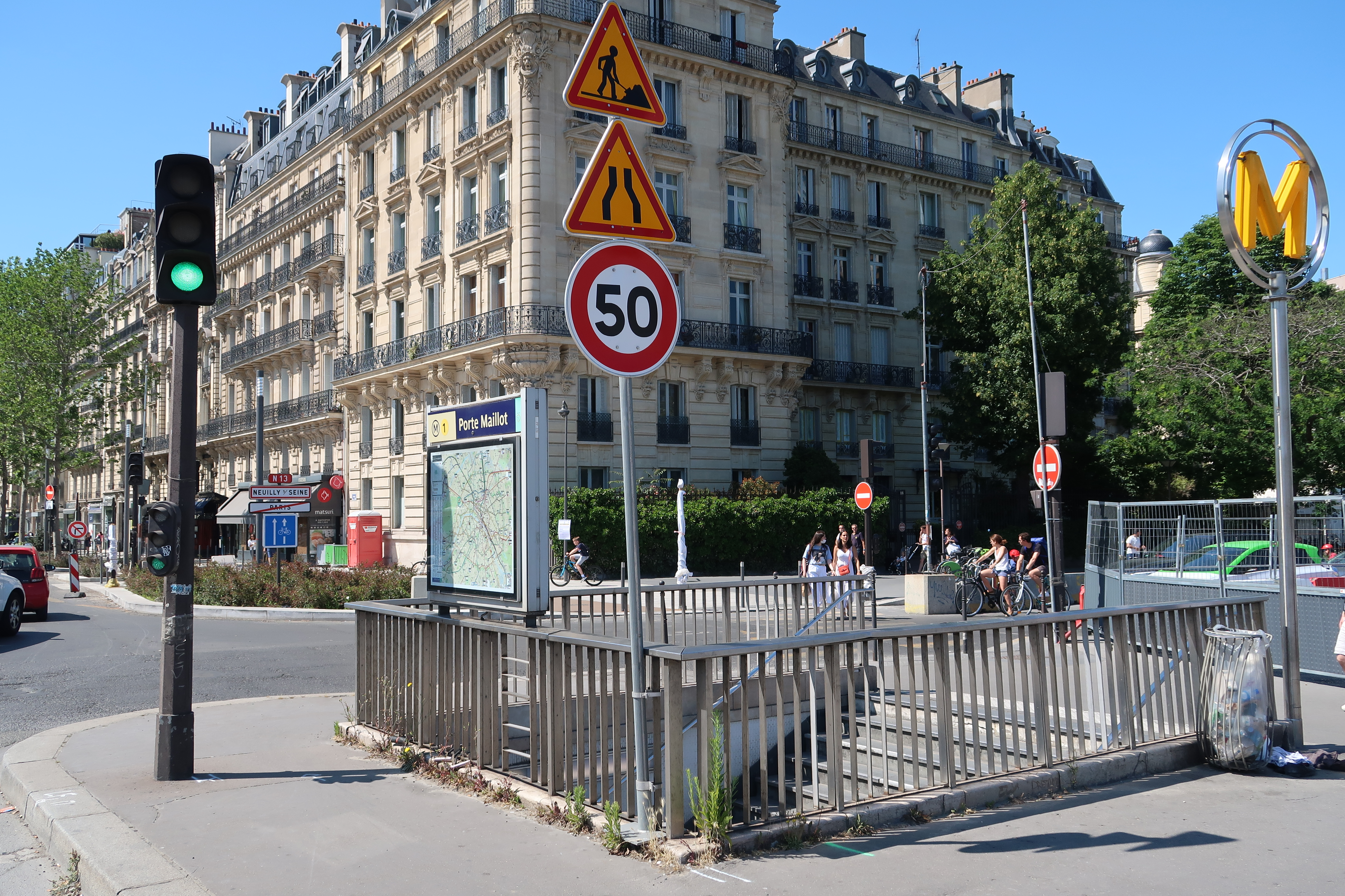 Bouche du métro Porte-Maillot (Paris, 16e).